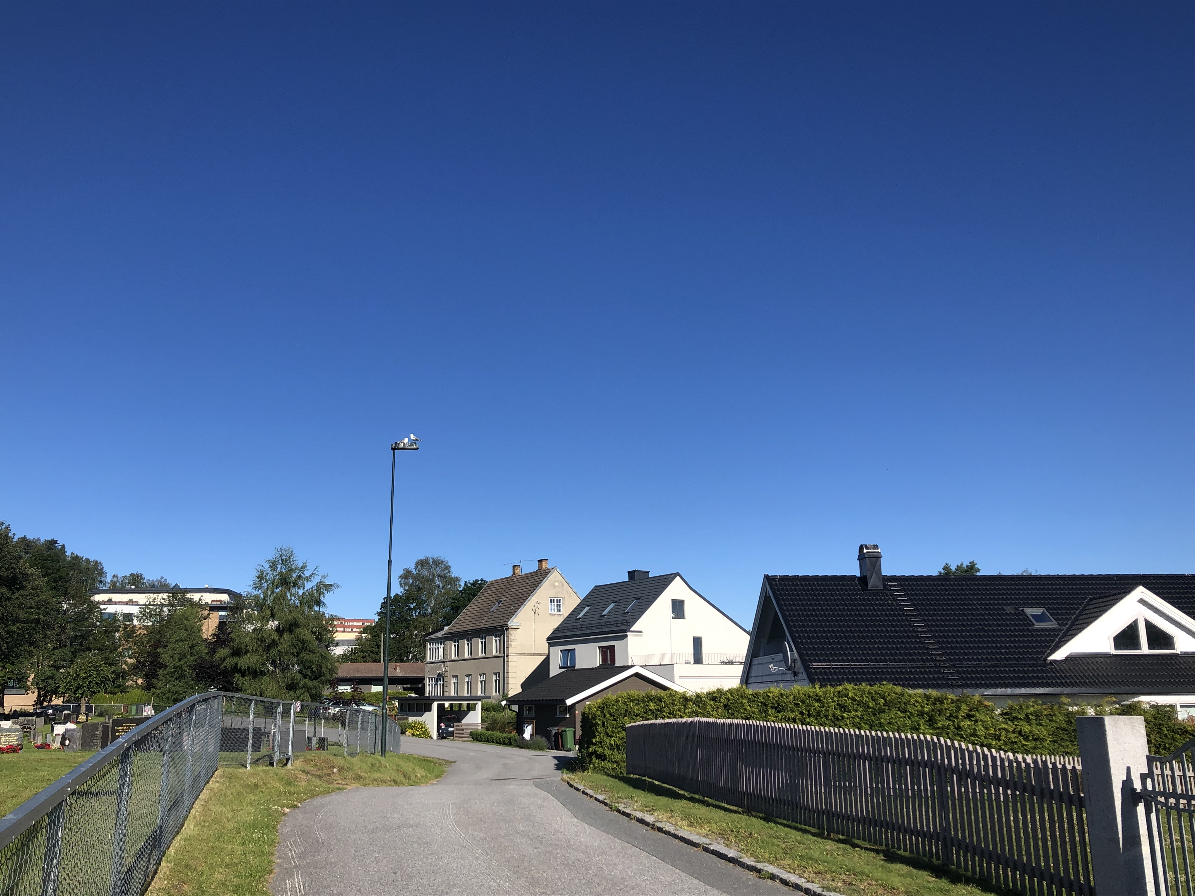 Hofgaards gate i Hønefoss.